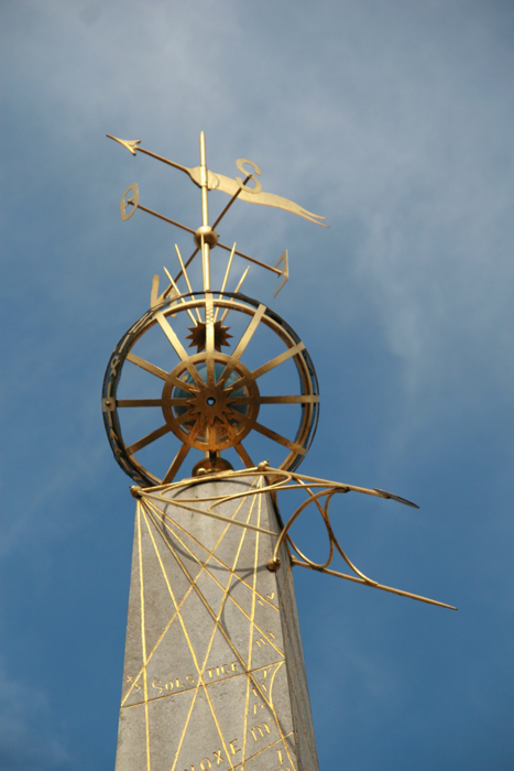 Sphère armillaire coiffant le monument dédié à Jean-Charles Houzeau, Astronome belge (Place Louise à Mons)